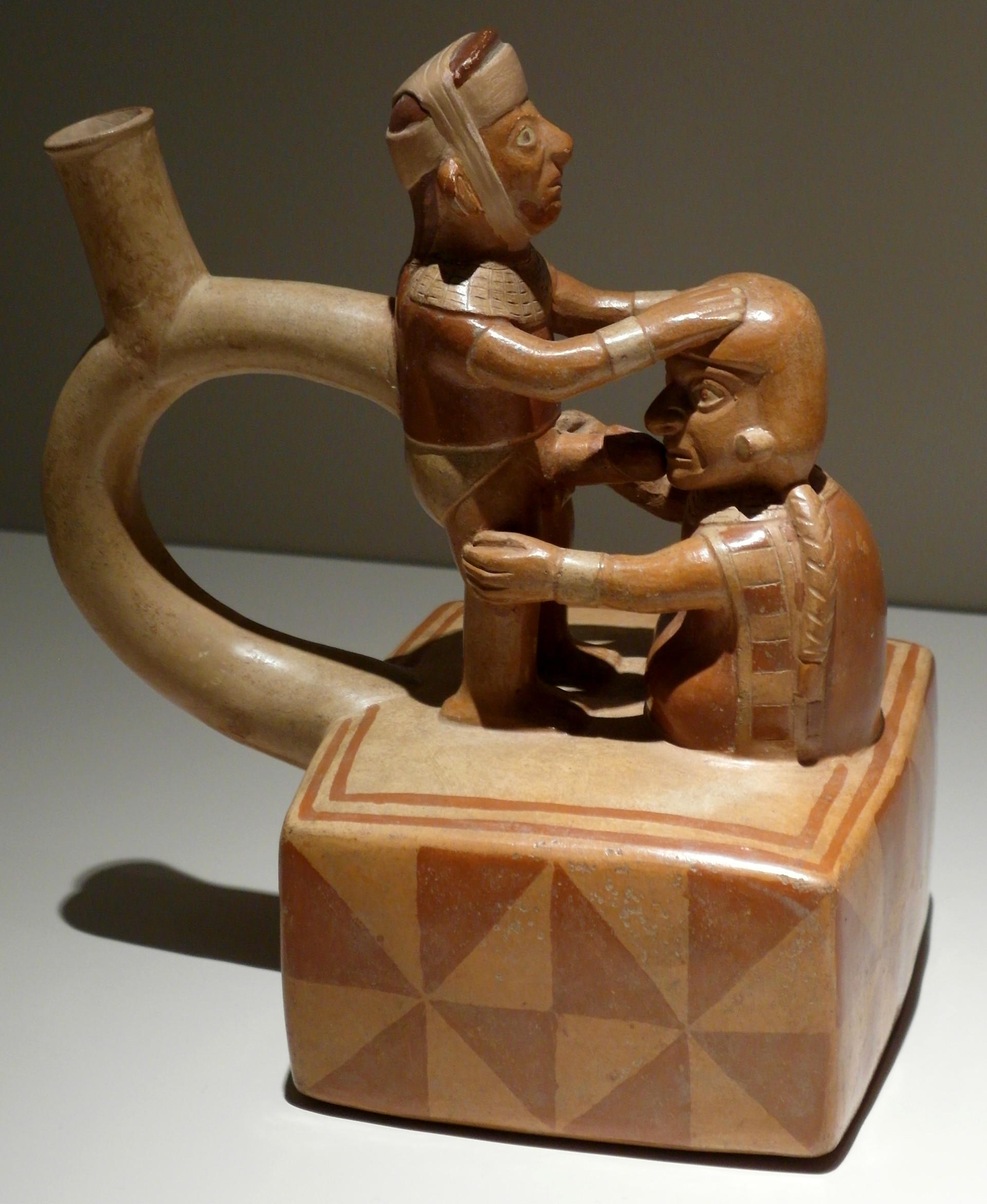 Recipiente mochica con escena de felación.